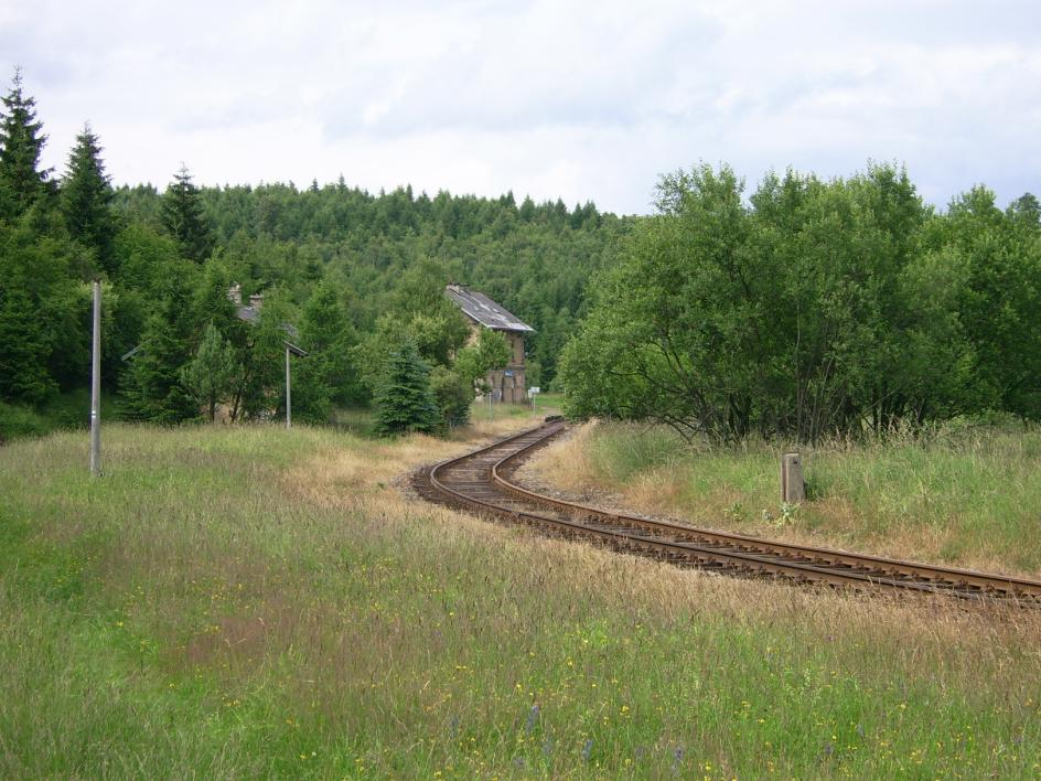 Pohled na trať 135 (Moldavská horská dráha) u stanice Mikulov-Nové Město, jež je vidět v pozadí